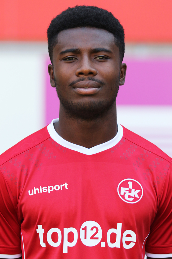 Manfred Osei Kwadwo